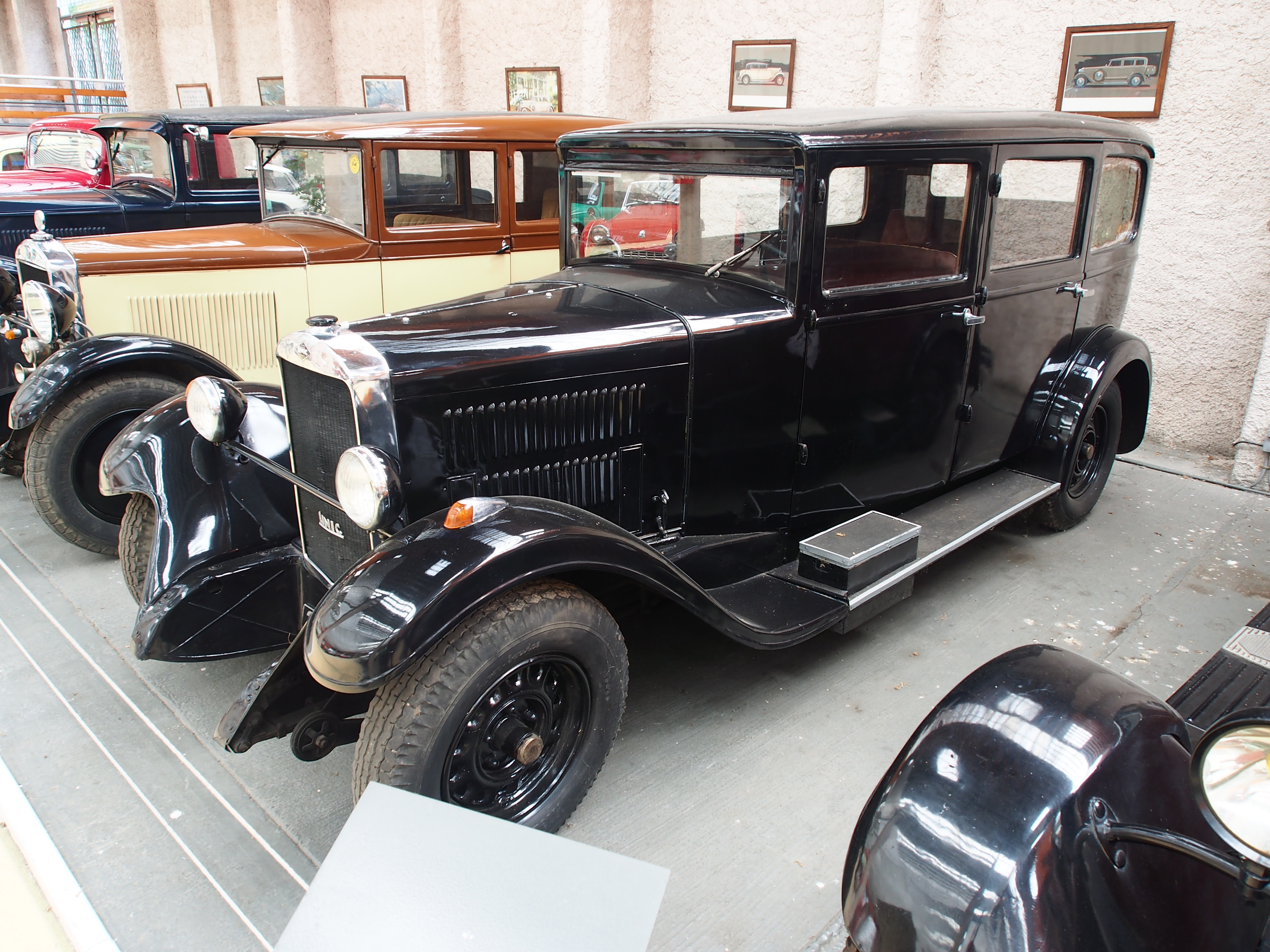 Photographed at the Association Lorraine des Amateurs d'Automobiles de collection et de loisirs.